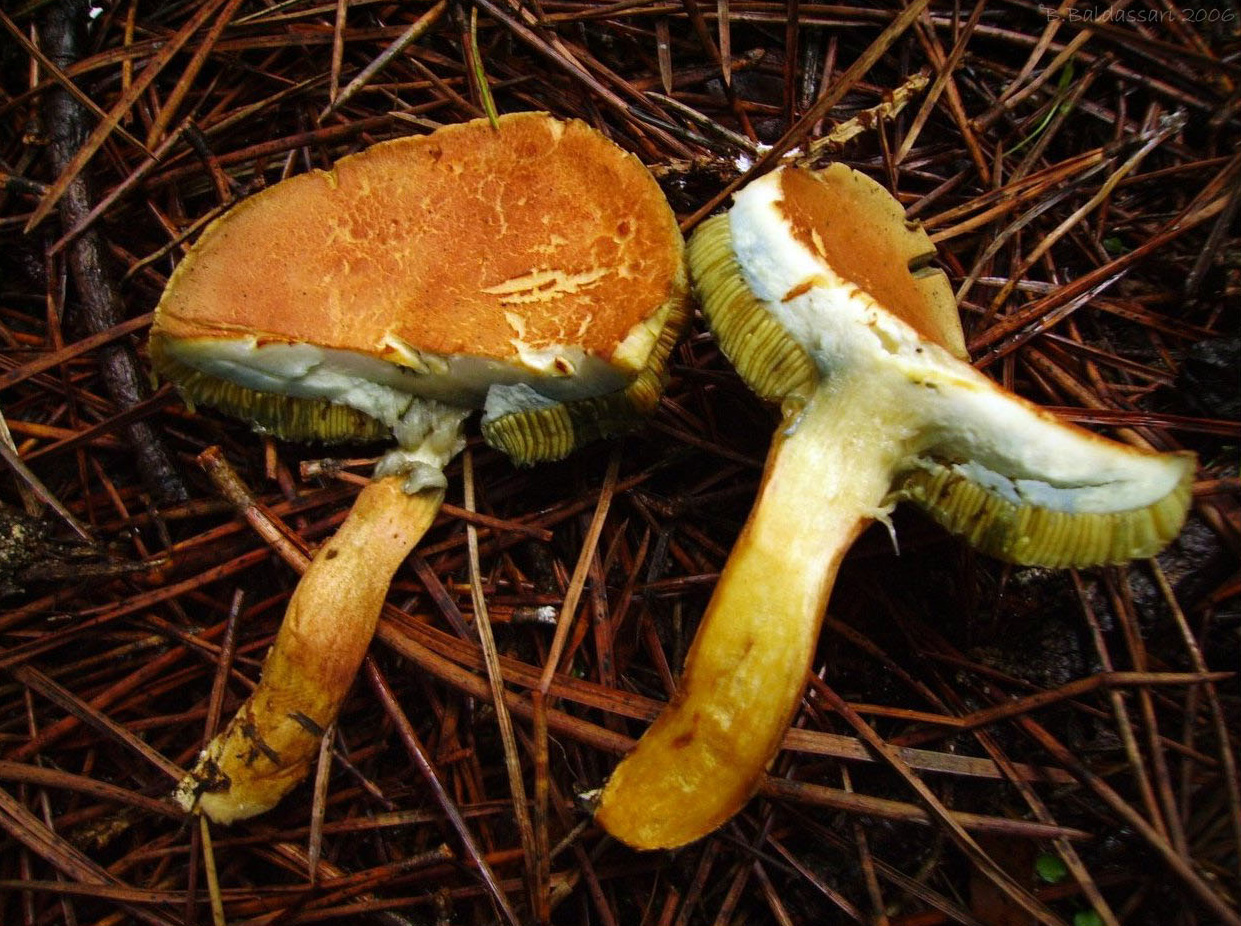 Xerocomus armeniacus - sezione - S.Rossore (PI) - 10/2006 immagine personale